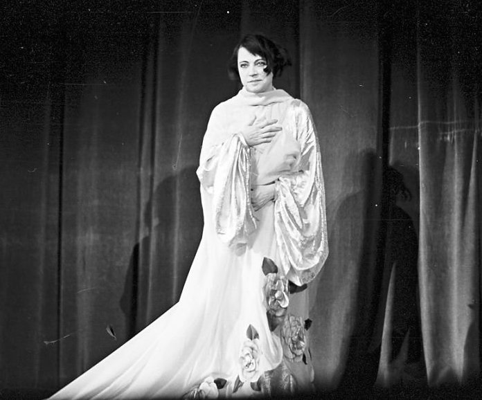 Scala (Berlin): Asta Nielsen; (in 5. Akt von Kameliendame)